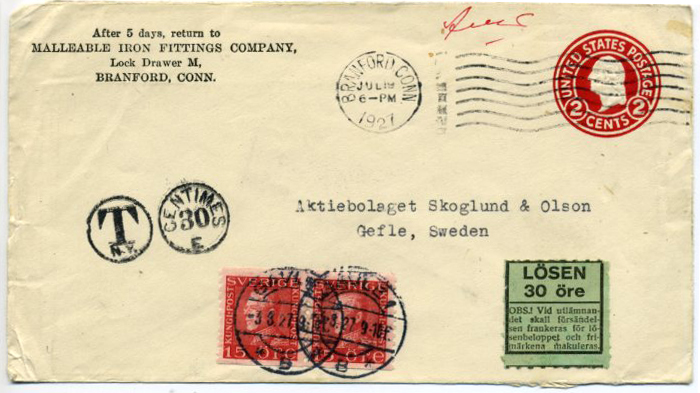 Почтовый конверт, отправленный из США в Швецию, с доплатной наклейкой Швеции, 1927 год